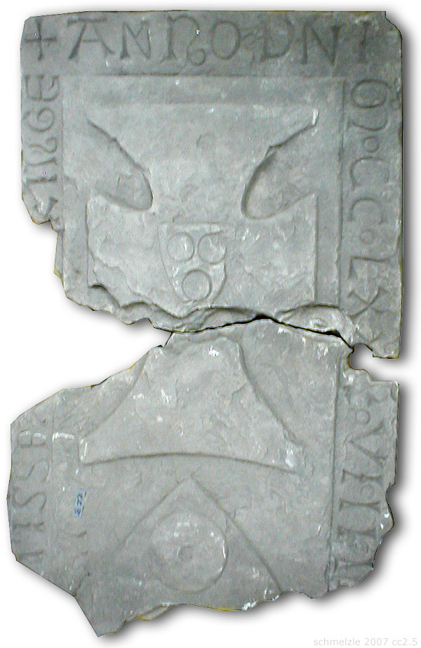 Grabplatte einer 1288 verstorbenen Frau aus dem Geschlecht derer von Böckingen, gefunden 1900 beim Umbau der Stadtkirche St. Pankratius in Böckingen (heute: Heilbronn-Böckingen). Aufgenommen im Lapidarium Heilbronn, freigestellt und mit Schatten versehen. ANNO DOMINI M CC LXXX VIII IN DIE SANCTIJ VRBANI OBIIT ...ABBATISSA DE BECKINGE. (Inschrift siehe im Aufsatz von K. H. Mistele: Das Kloster Mariental in Böckingen - die kirchengeschichtliche Problematik , Histor. Verein Heilbronn 24. Veröffentlichg 1963, Seite 46)